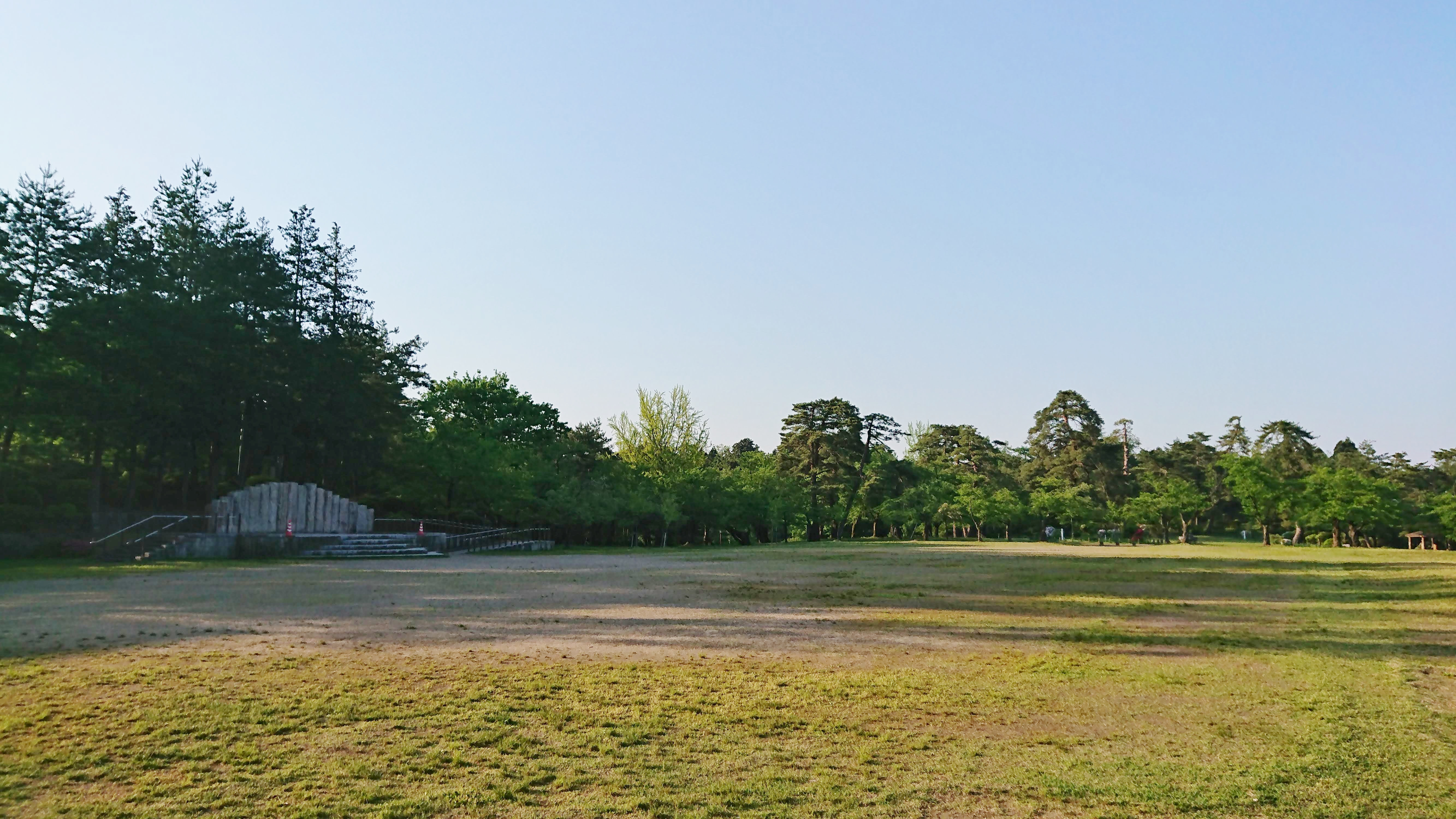 悠久山公園の広場